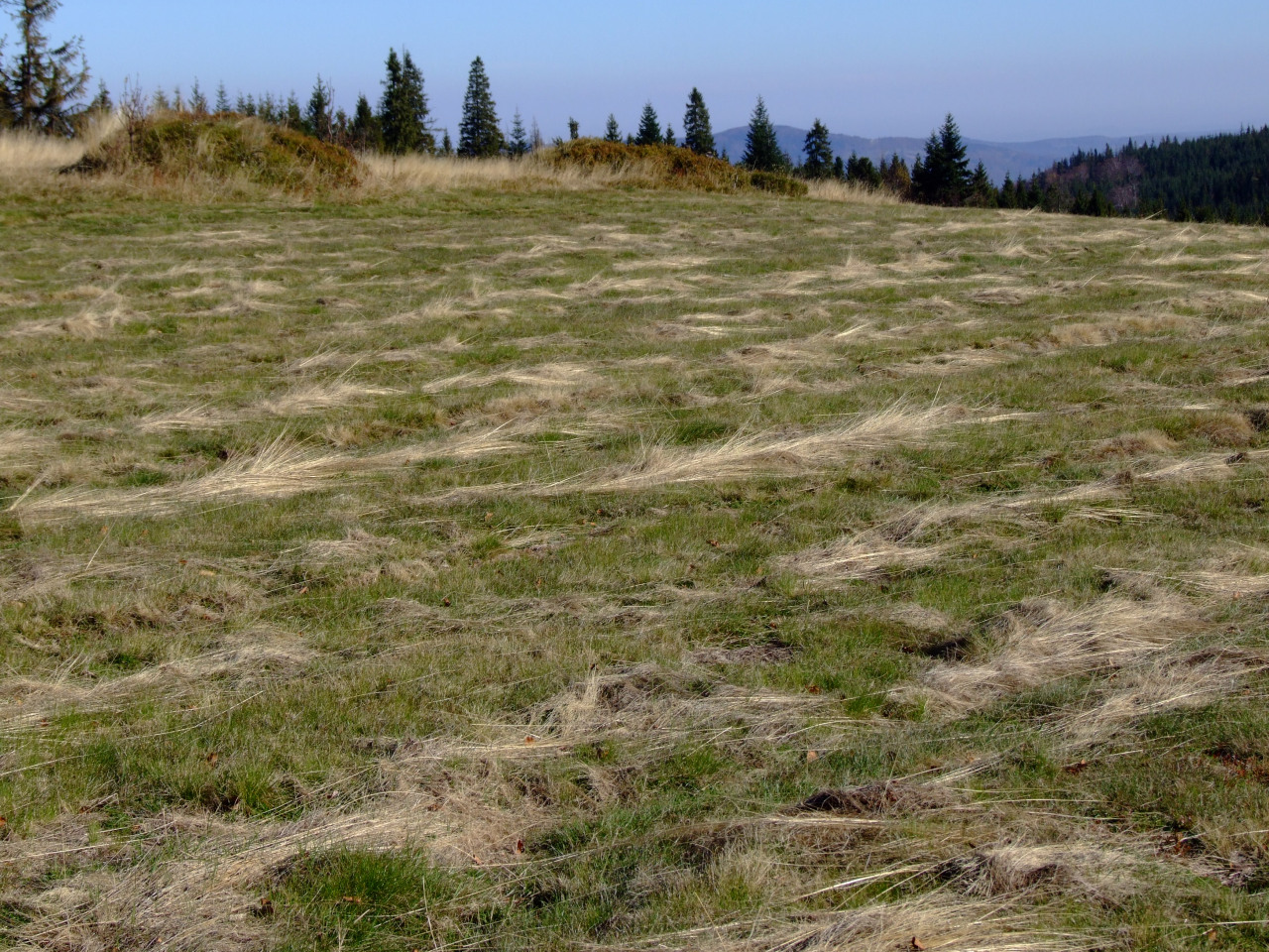 Polana Jaworze na Łopieniu (Beskid Wyspowy).